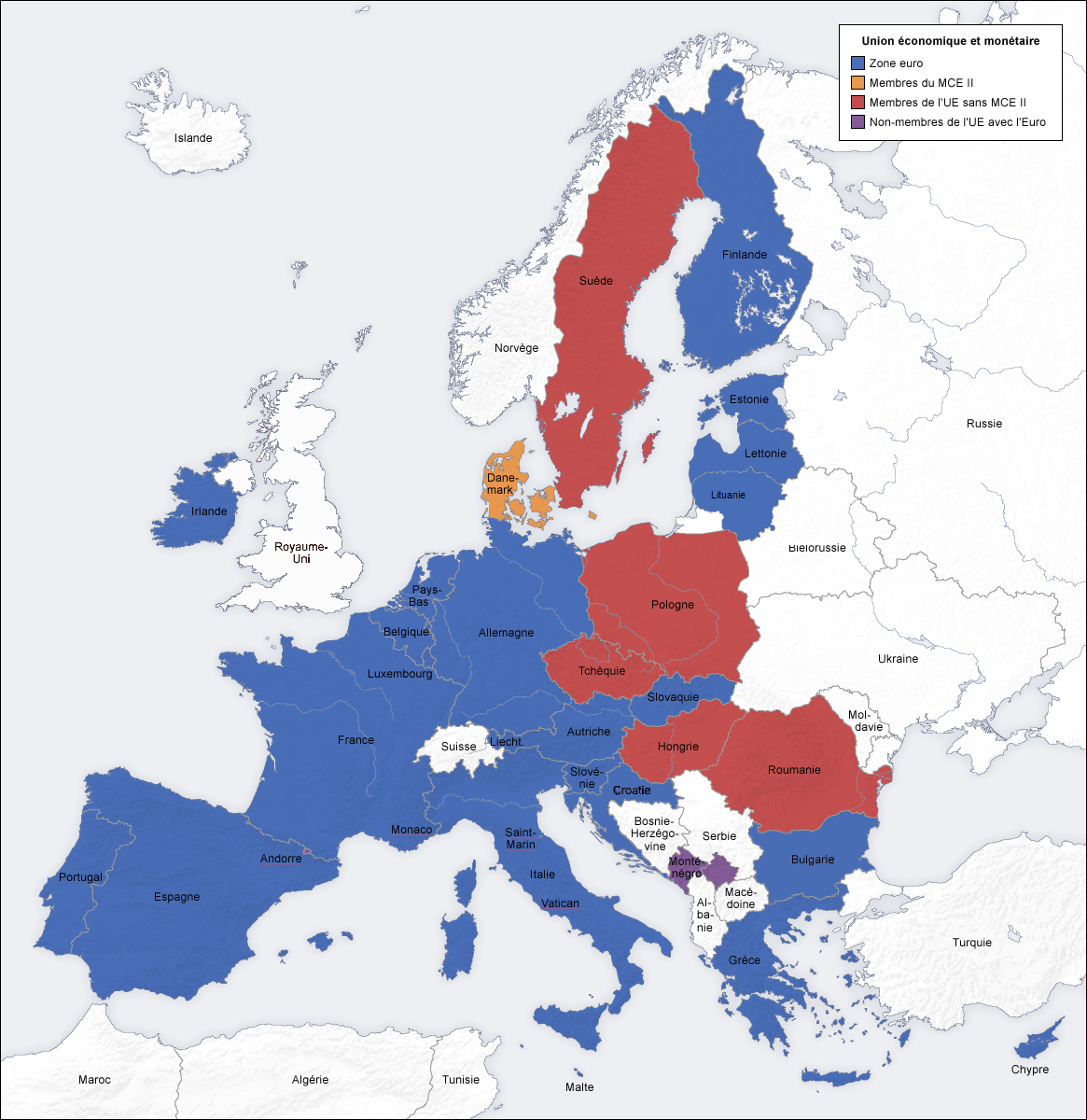 union économique et monétaire, carte fr